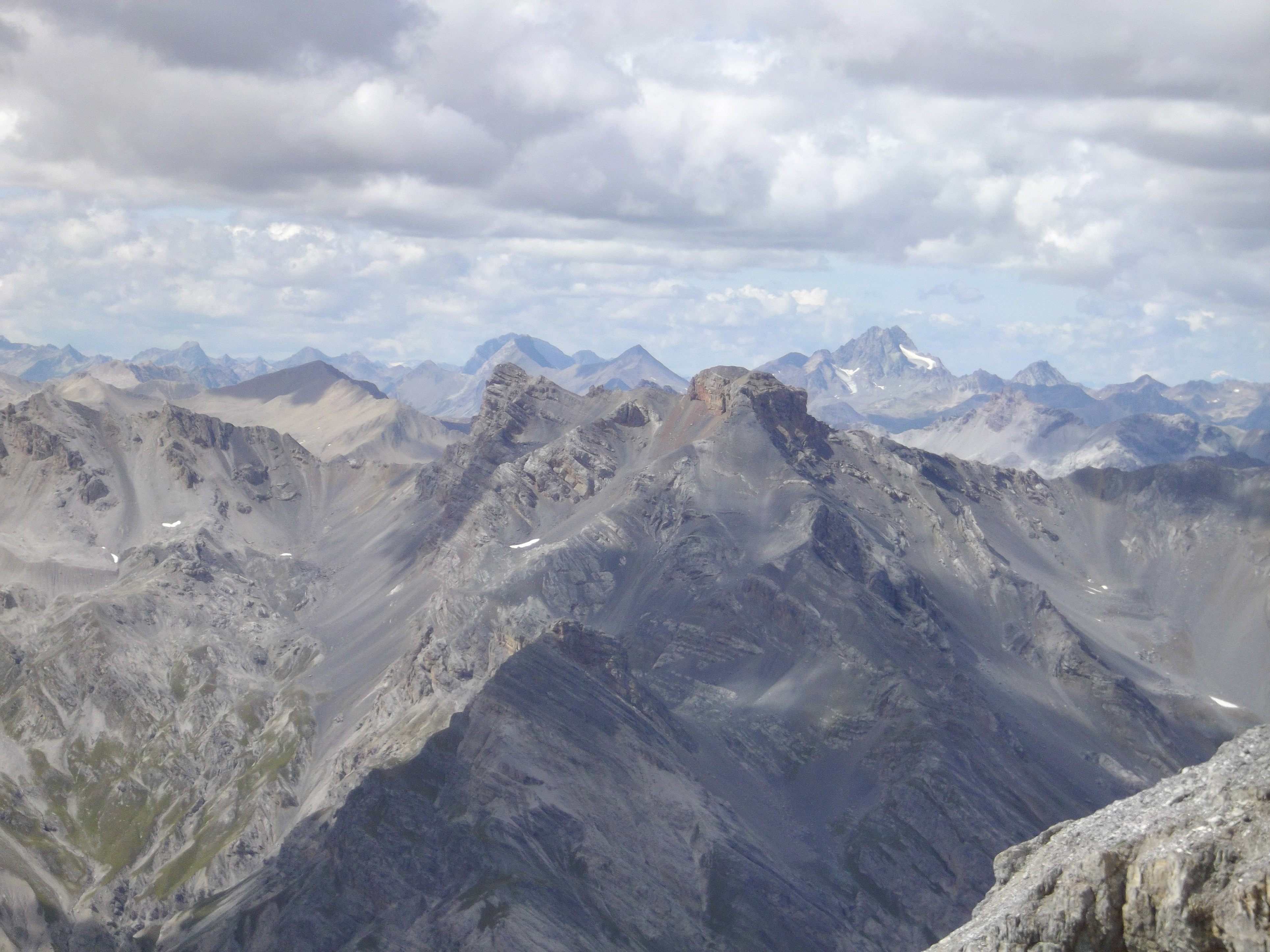 Monte Cassa del Ferro vom Gipfel des Piz Murtaröl